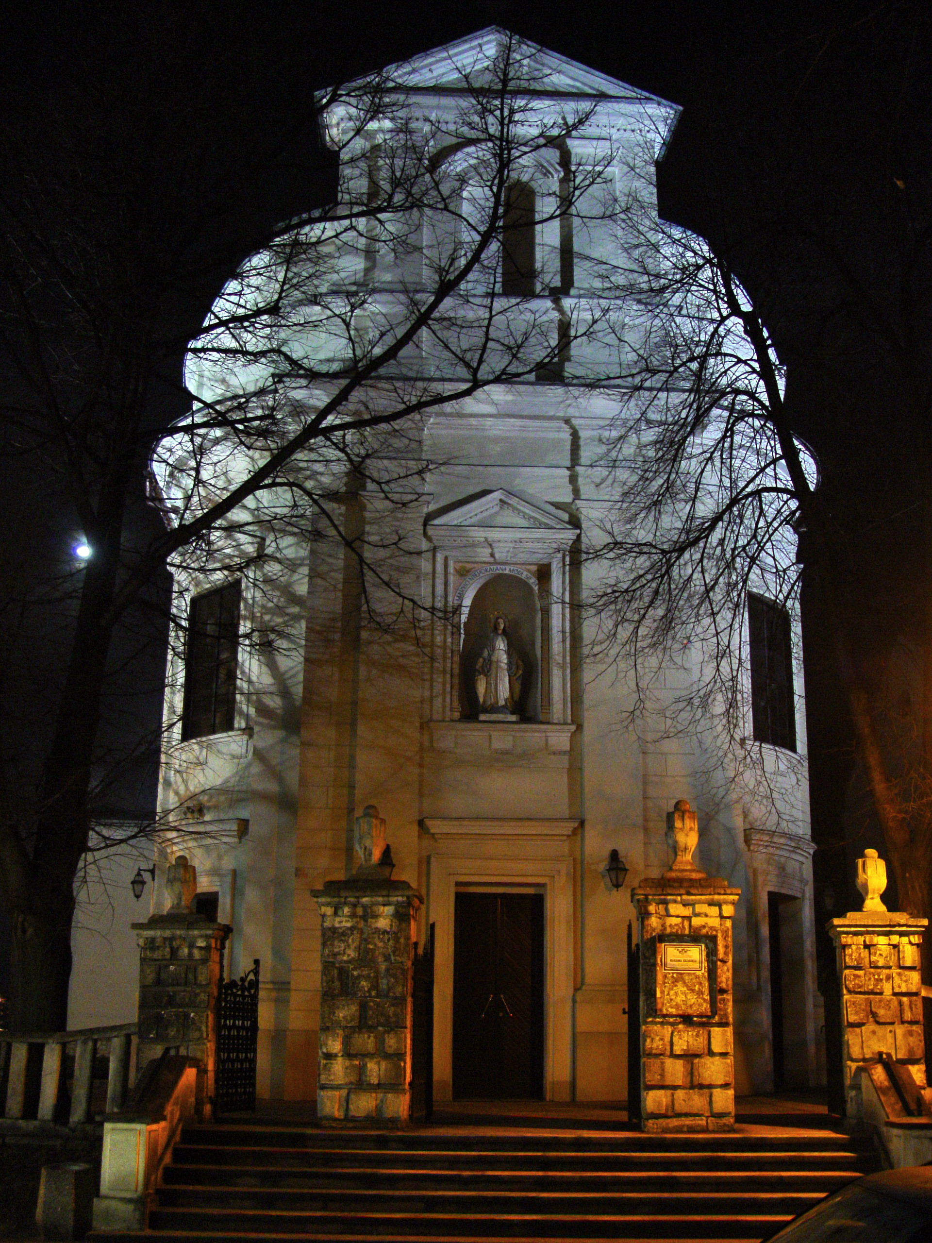 Kościół pw.NPNMP w Busku-Zdroju, widok w nocy od wschodu na fasadę.